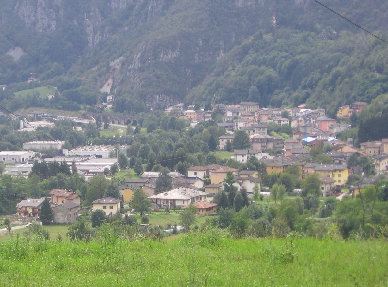 Lenna, Bergamo, Italy